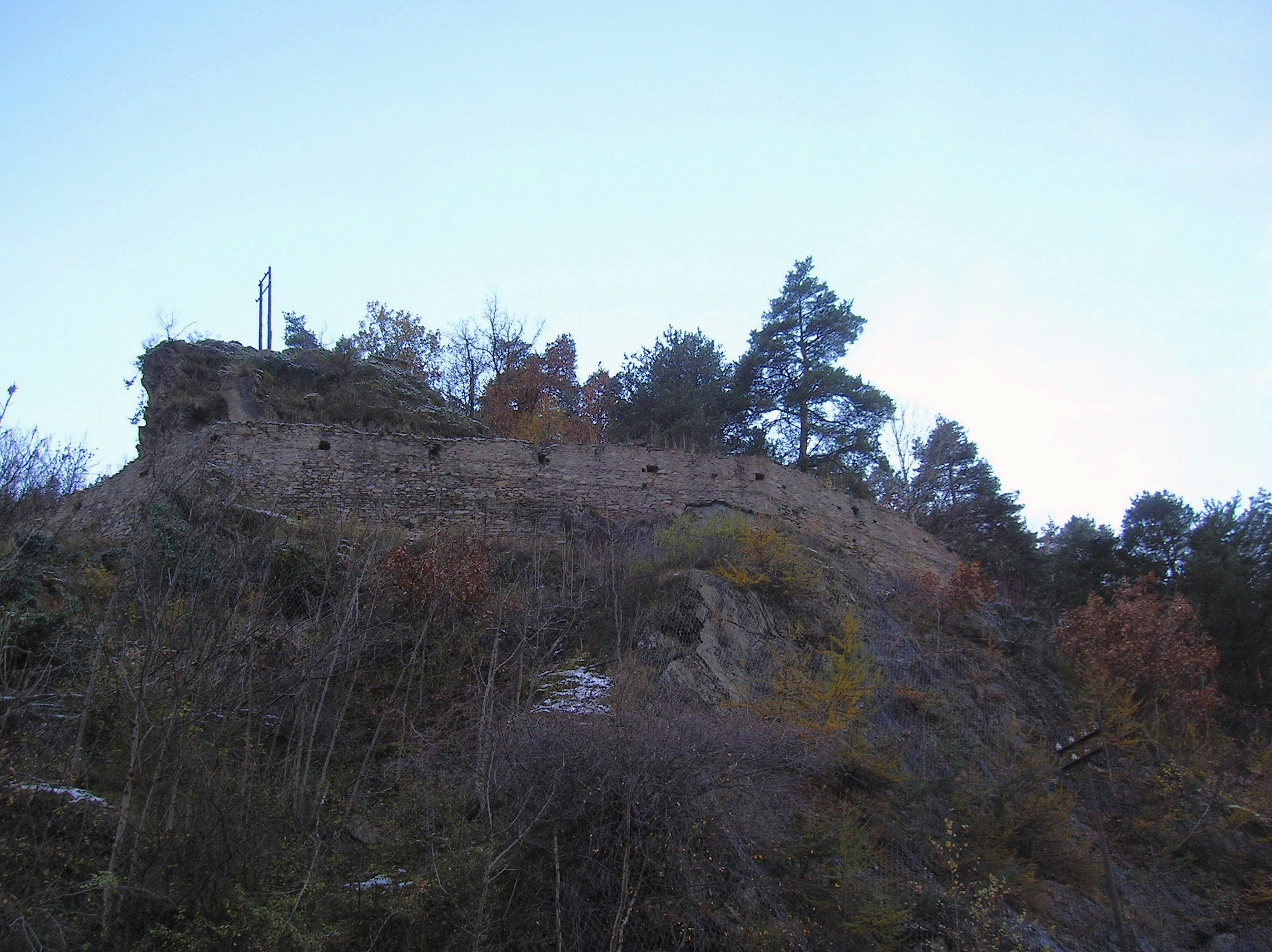 Tratto di via delle gallie nei pressi di Avise, Valle d'Aosta, Italia.